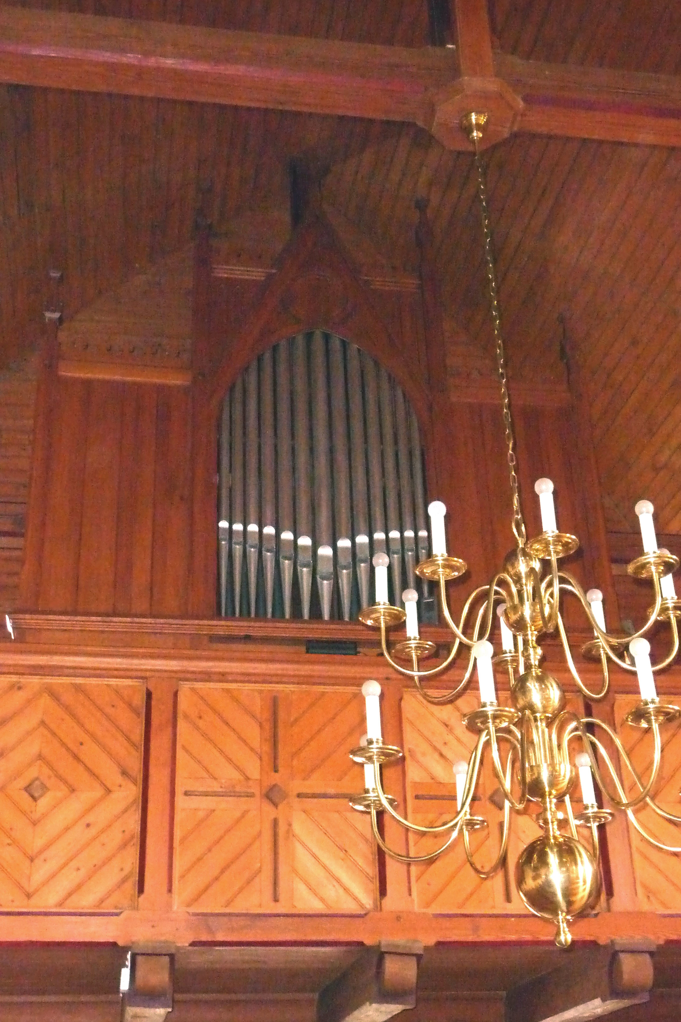 Orgel in der ev.-luth. Kreuzkirche Marcardsmoor